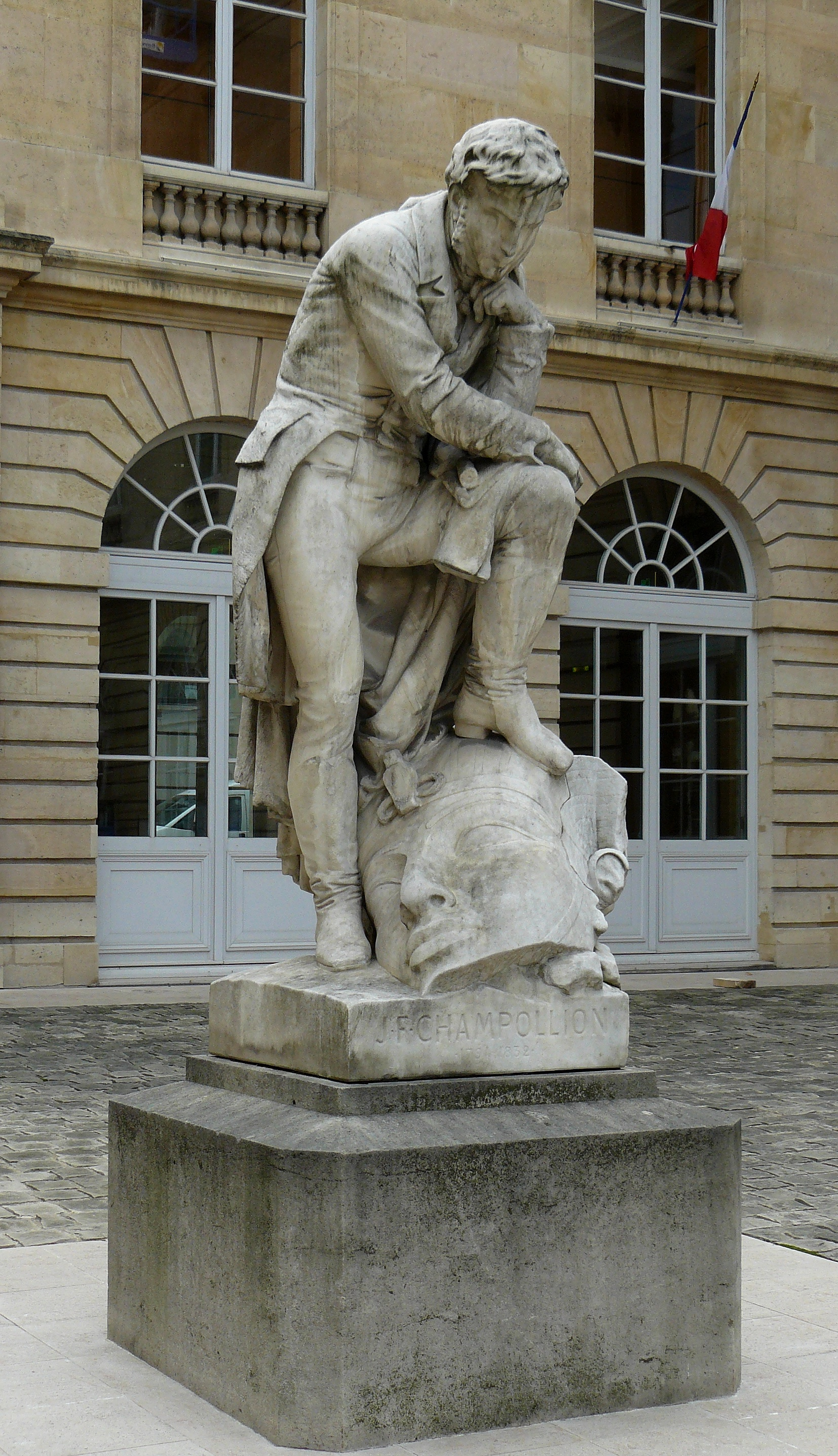 Statue de Jean-François Champollion, par Frédéric-Auguste Bartholdi, (marbre, 1875) - Cour sur rue du Collège de France, rue des Écoles, 5e arr. de Paris.